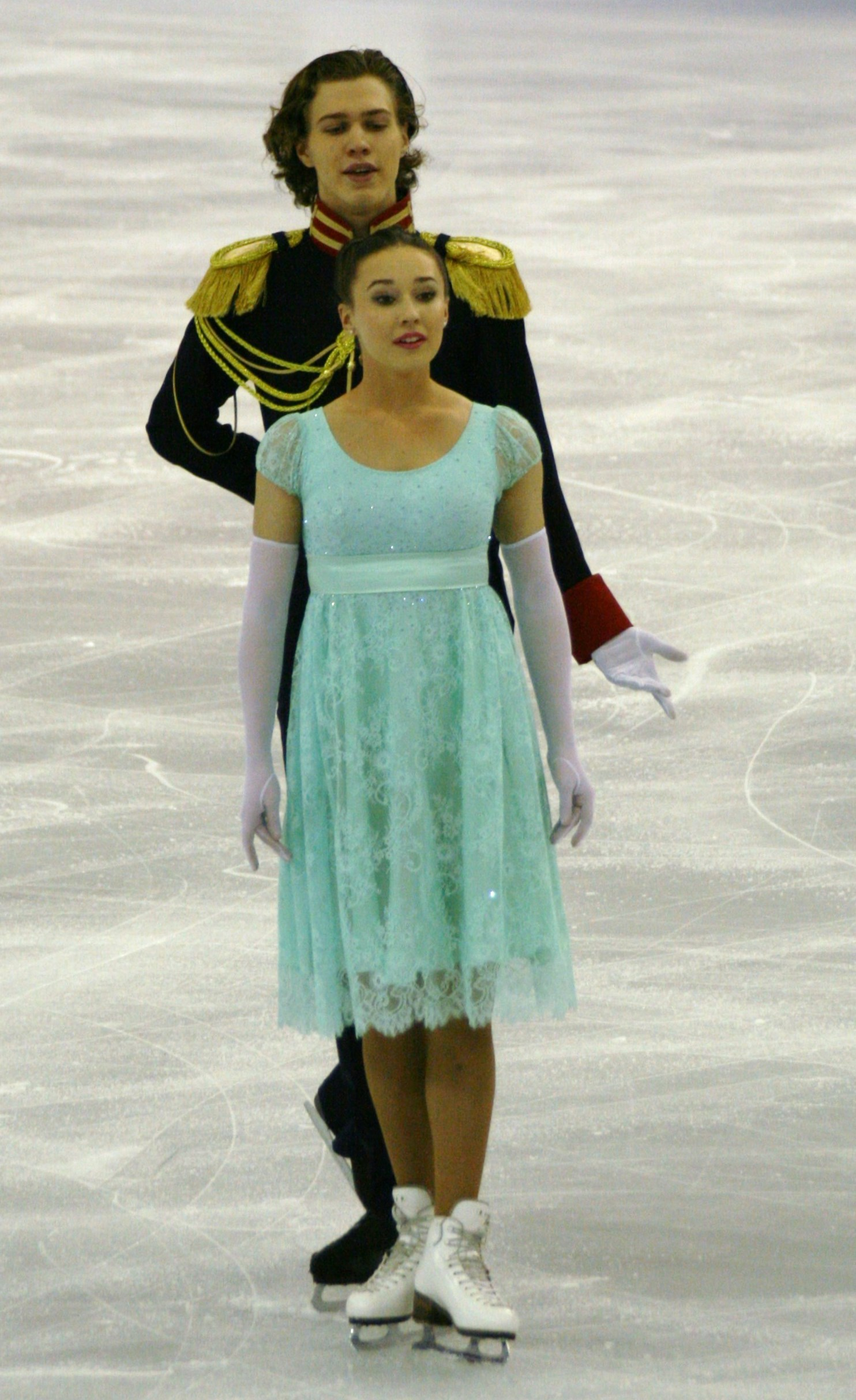 Алла Лобода и Павел Дрозд (Россия) на финале Гран-при по фигурному катанию среди юниоров 2015-2016.